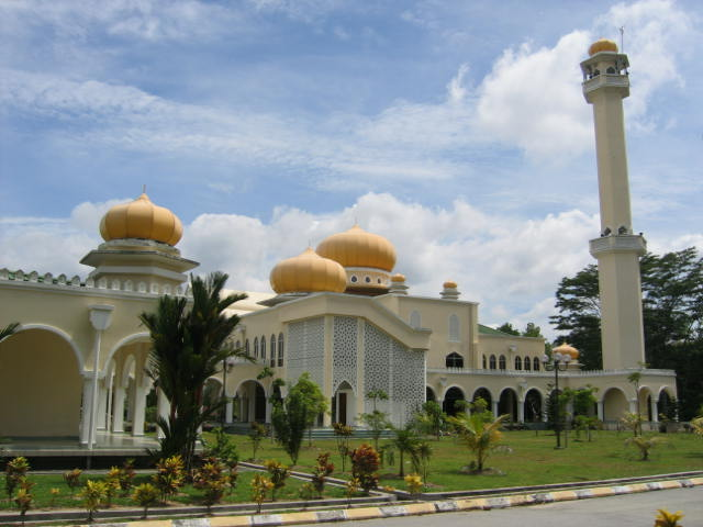 Mosque at Bandar Baru Salak Tinggi, Selangor, Malaysia